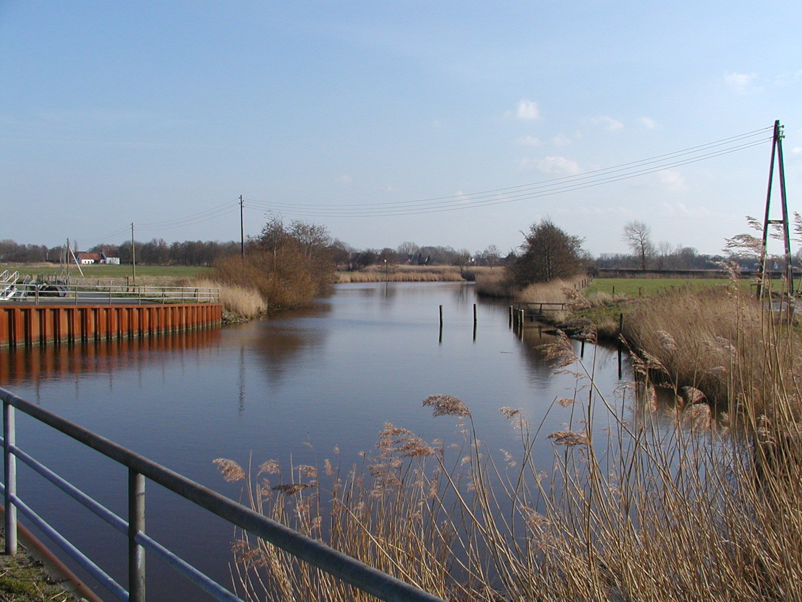 Der Altenbrucher Kanal an der Schleuse